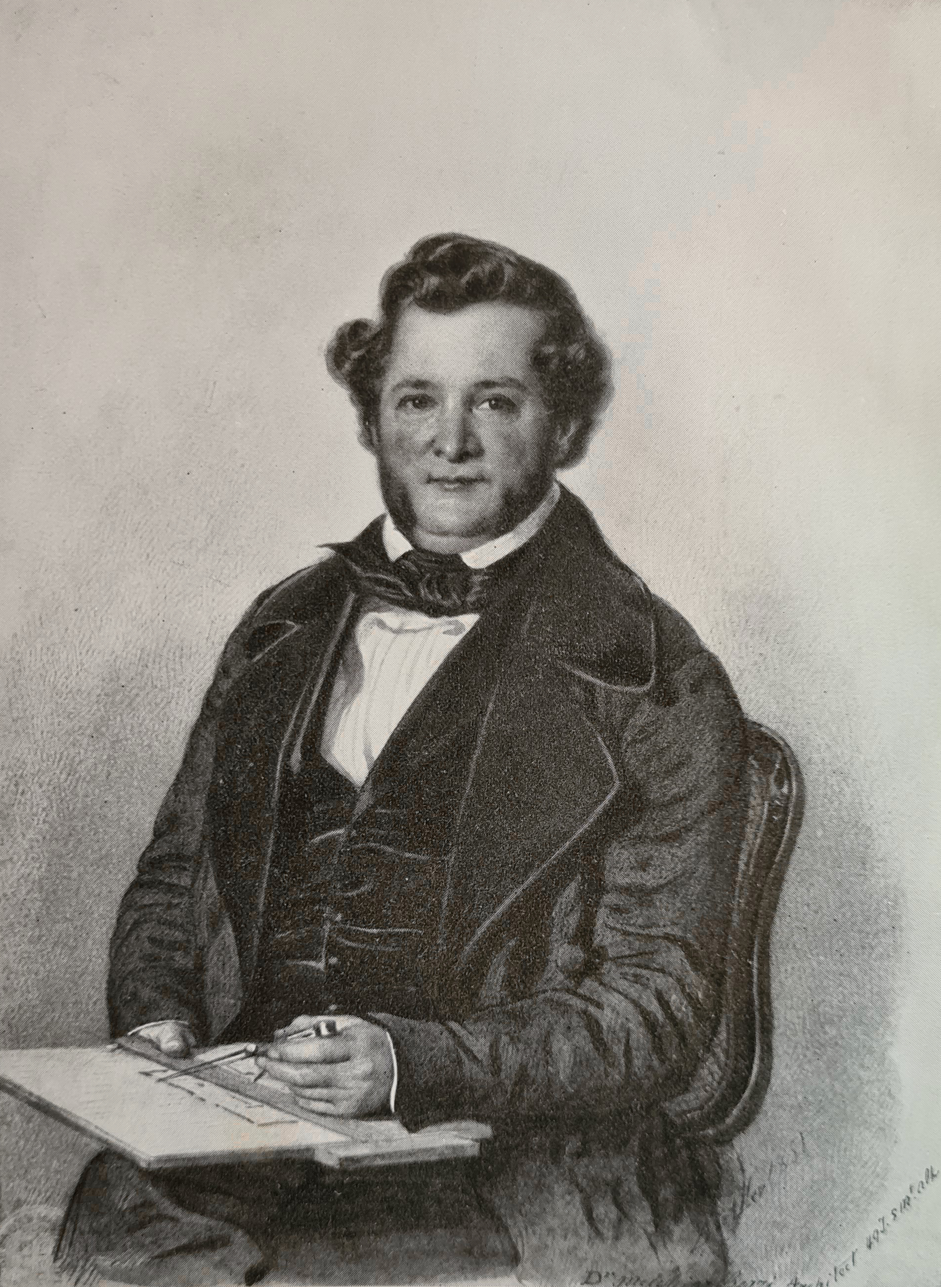 Bildnis Melchior Berri.